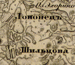 Деревни Лопанец и Шильцево на карте 1863 года.